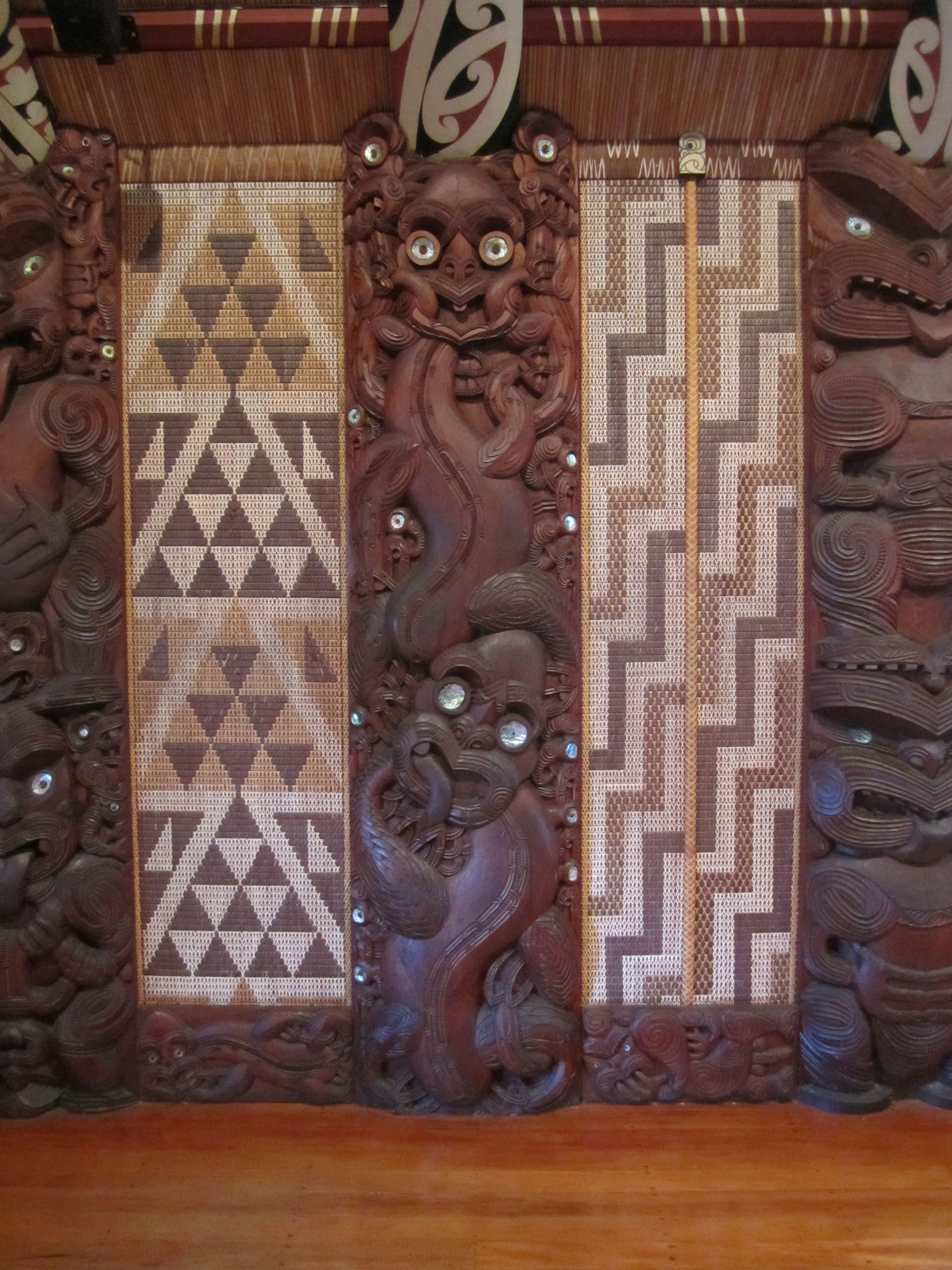 Whare Runanga Tikis